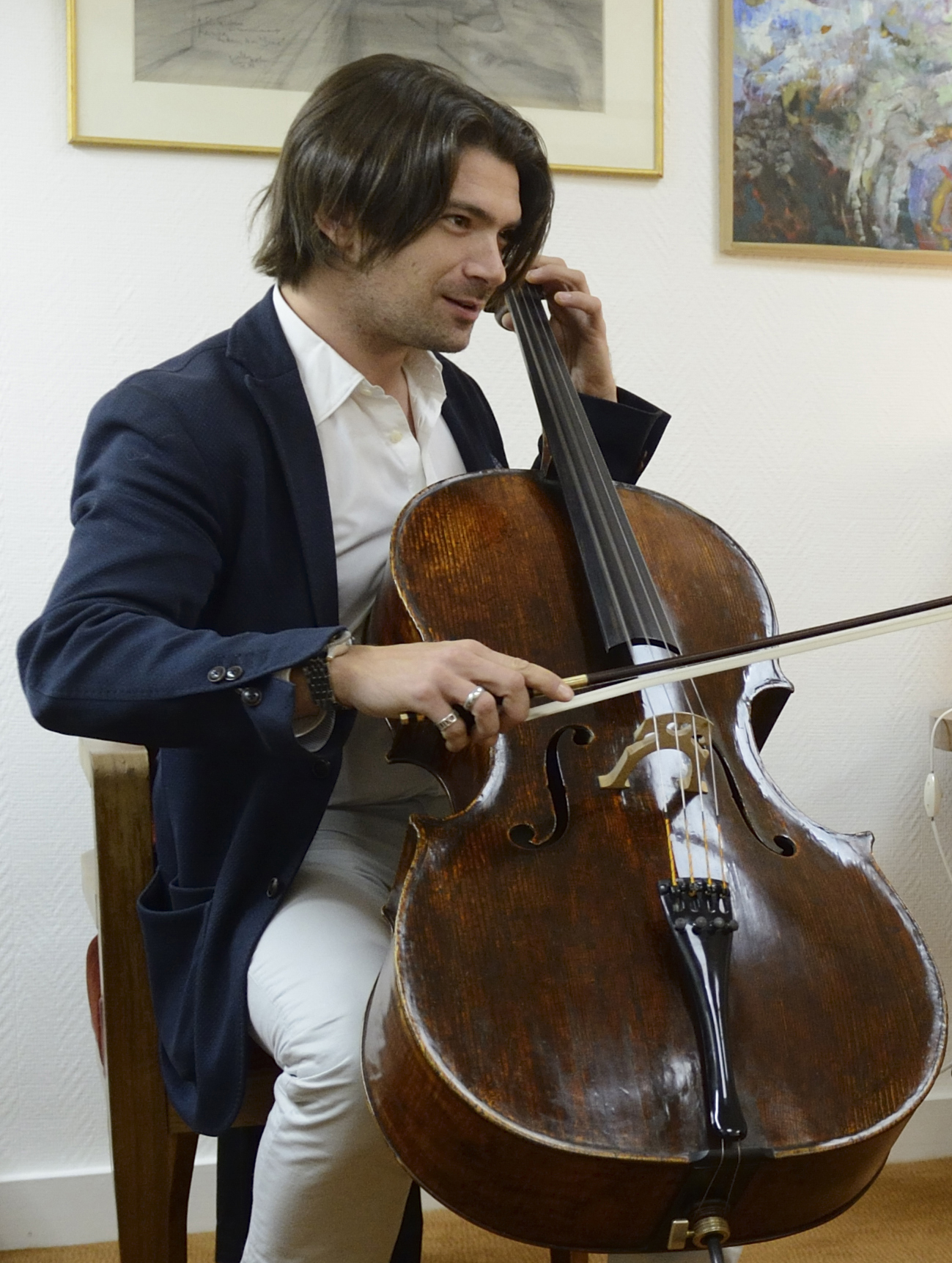 Echanges dans la loge avant le concert, entre le soliste